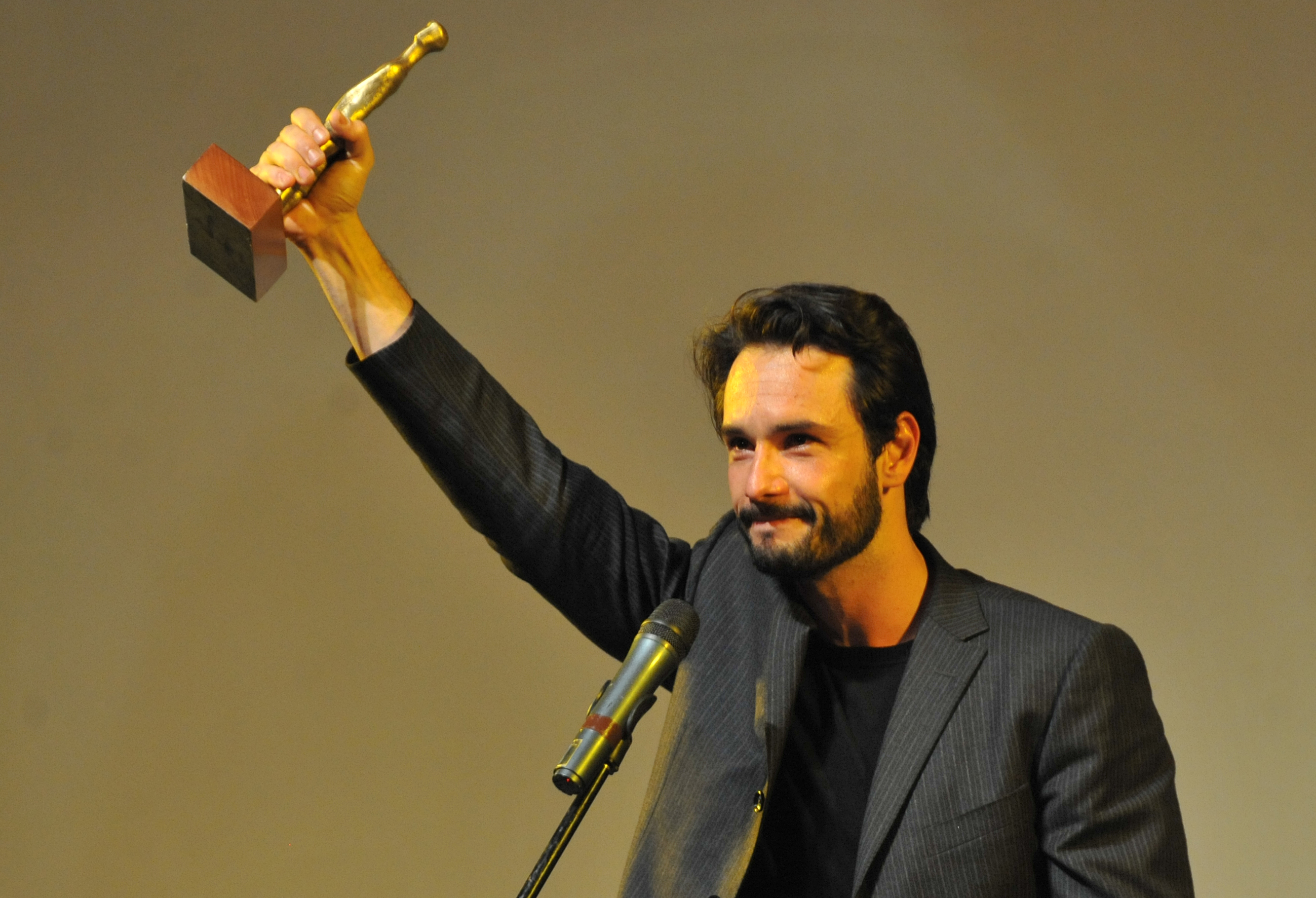 O ator brasileiro Rodrigo Santoro levanta uma estatueta que recebeu pelo prêmio de melhor ator no 44º Festival de Brasília pelo filme Meu País, de André Ristum.